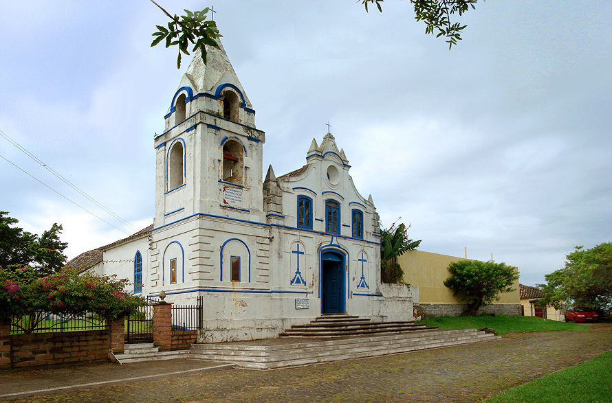 Igreja de São Domingos, Torres, Brasil.